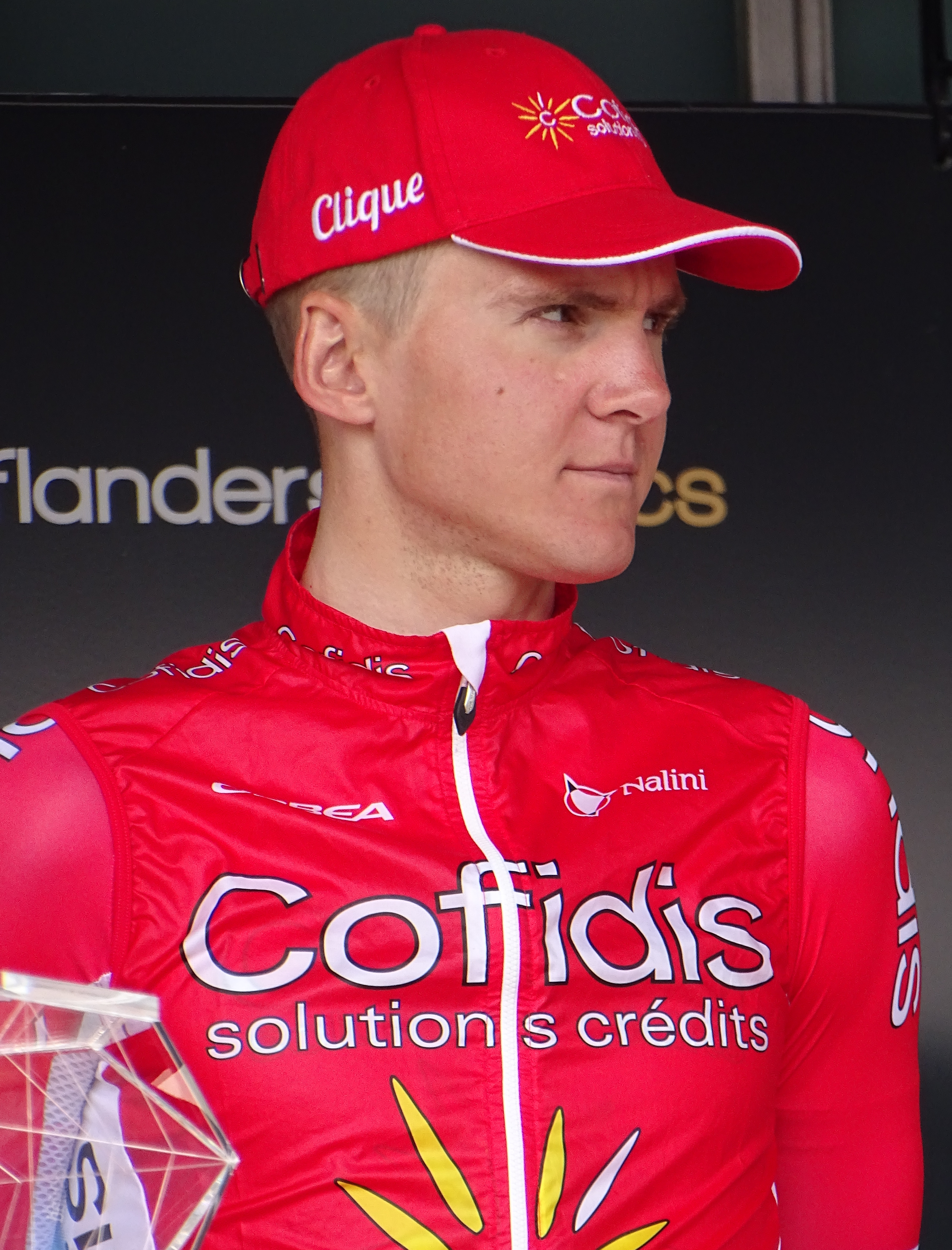 Reportage réalisé le mercredi 8 avril à l'occasion du départ du Grand Prix de l'Escaut 2015 à Anvers, Belgique.